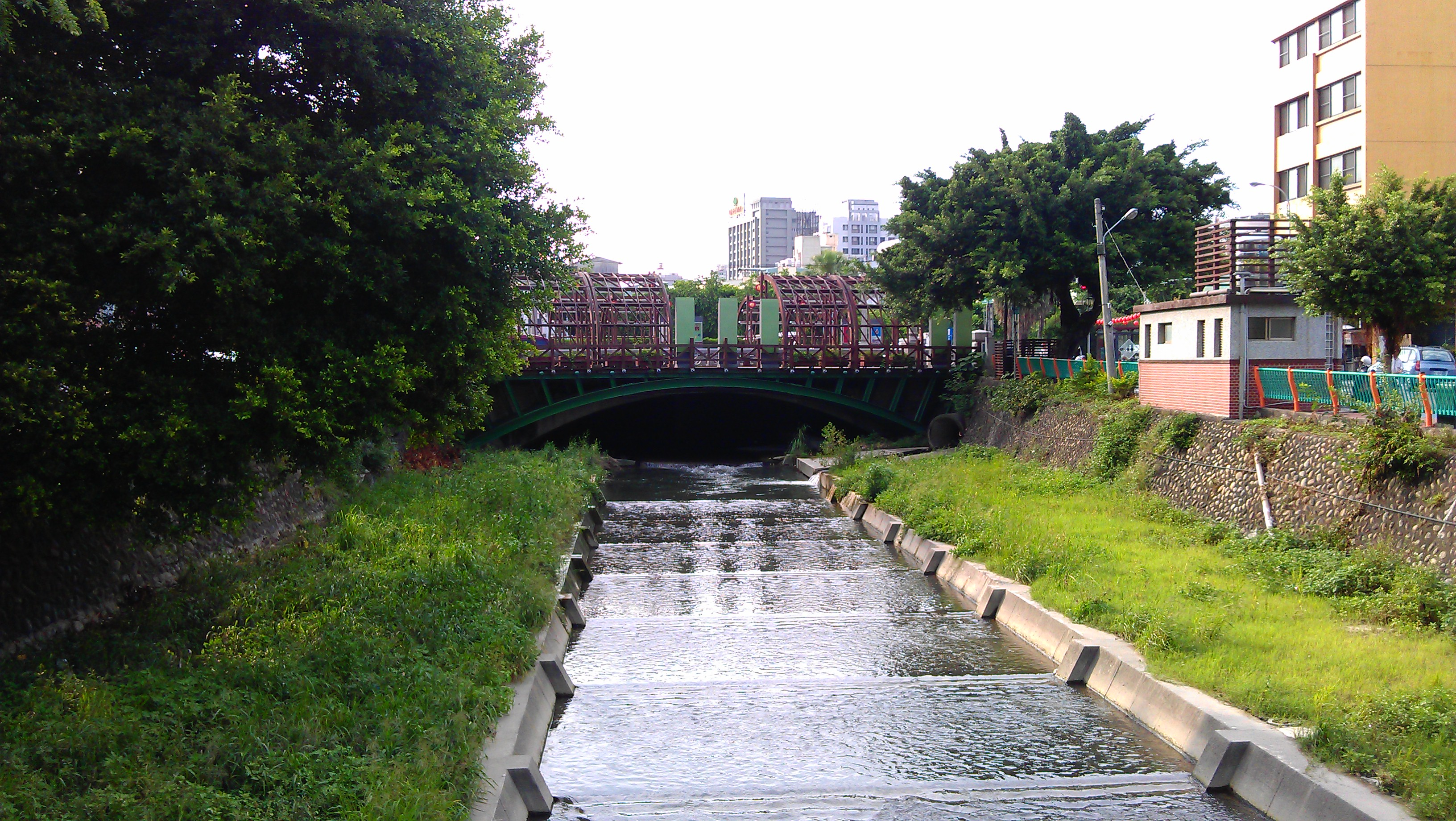 中文（台灣）: 臺中市的柳川。